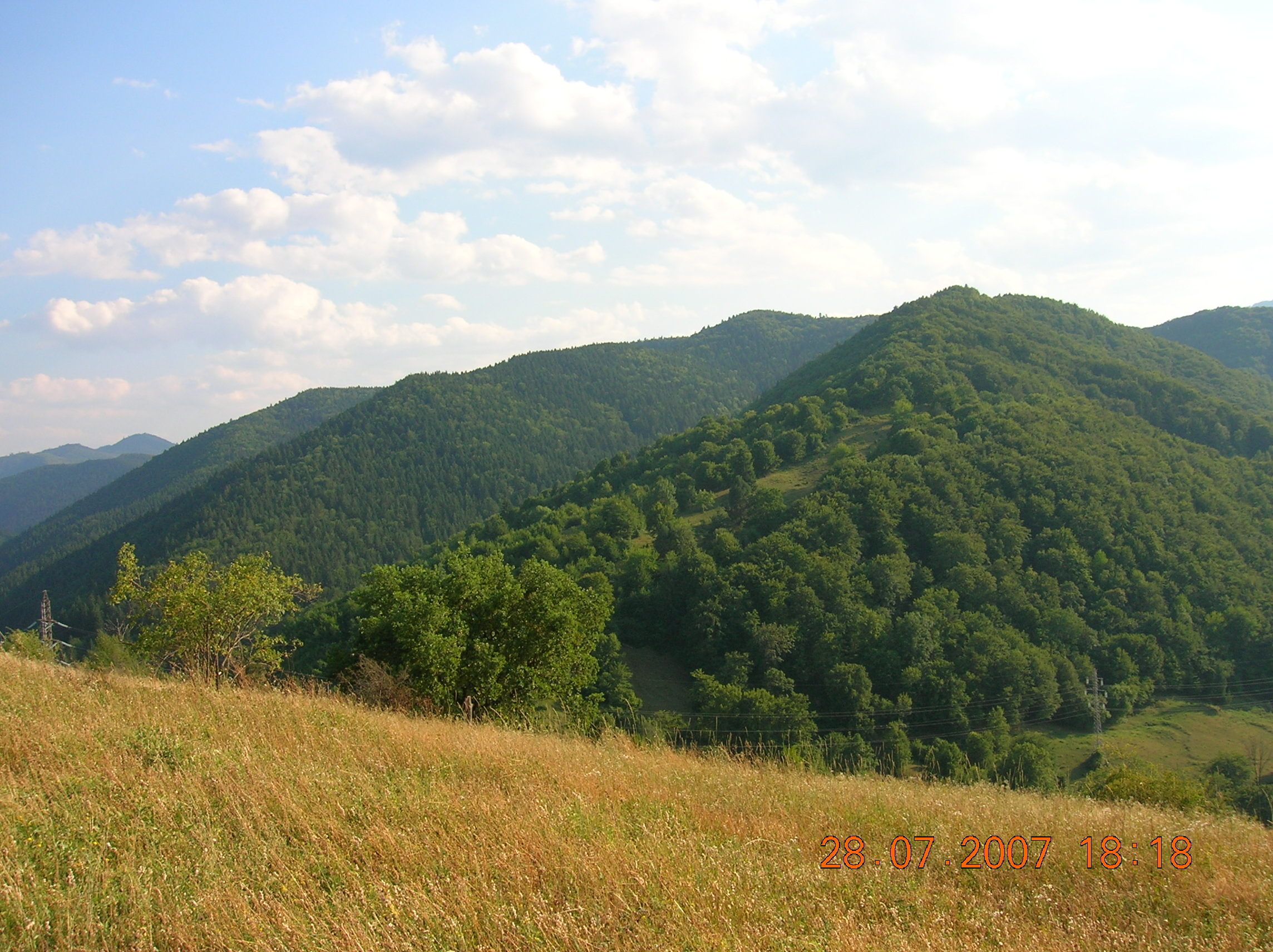 Munţii Tarcăului (Carpaţii Orientali, România)-de pe Bâtca Doamnei